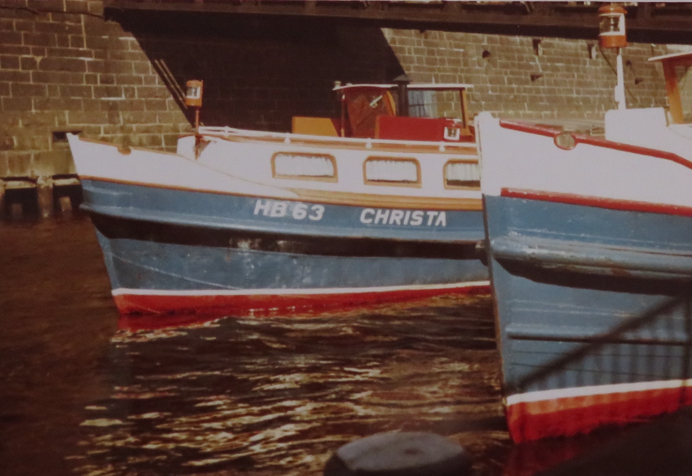 in Hamburg